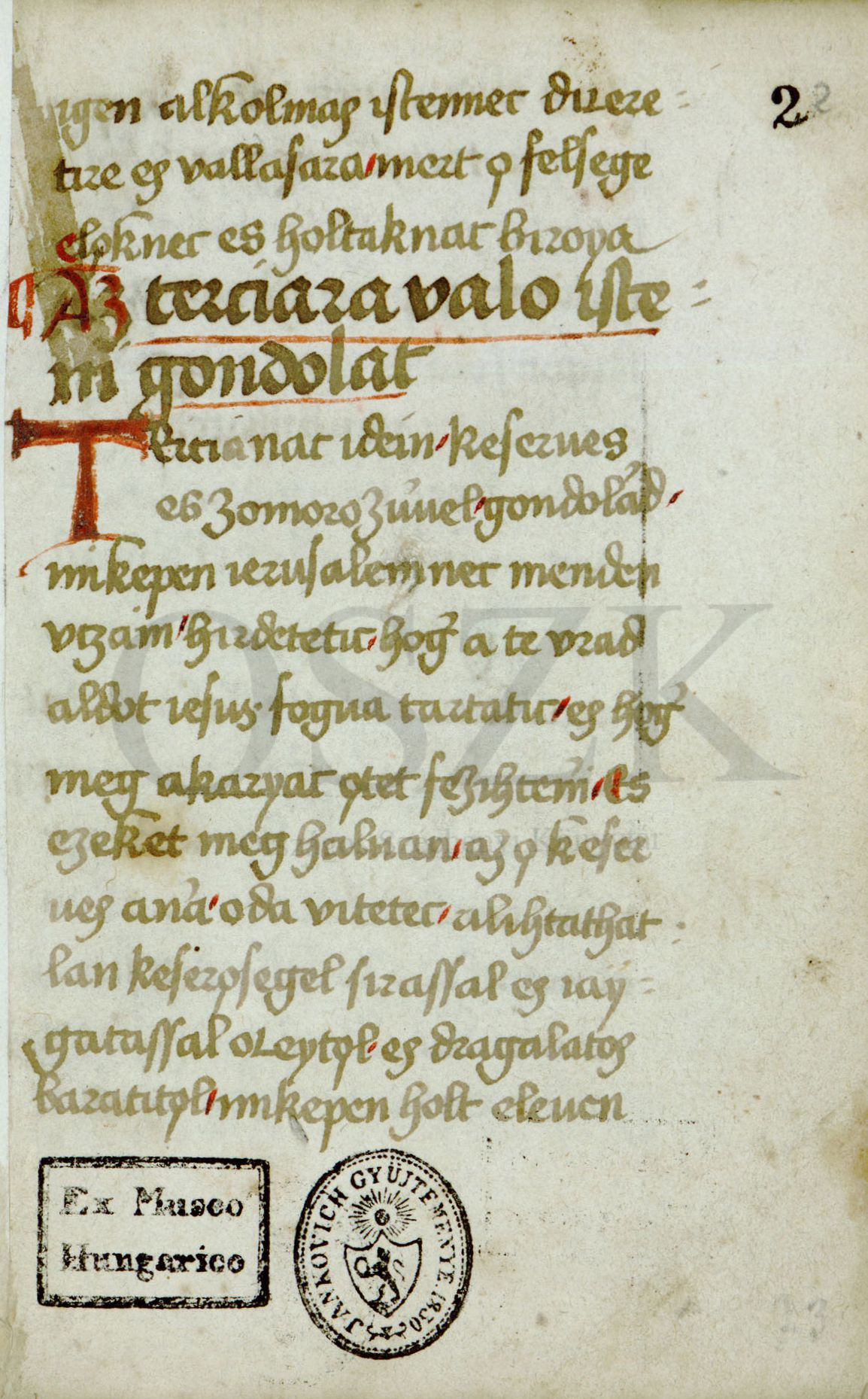 A Vitkovics-kódex harmadik lapja